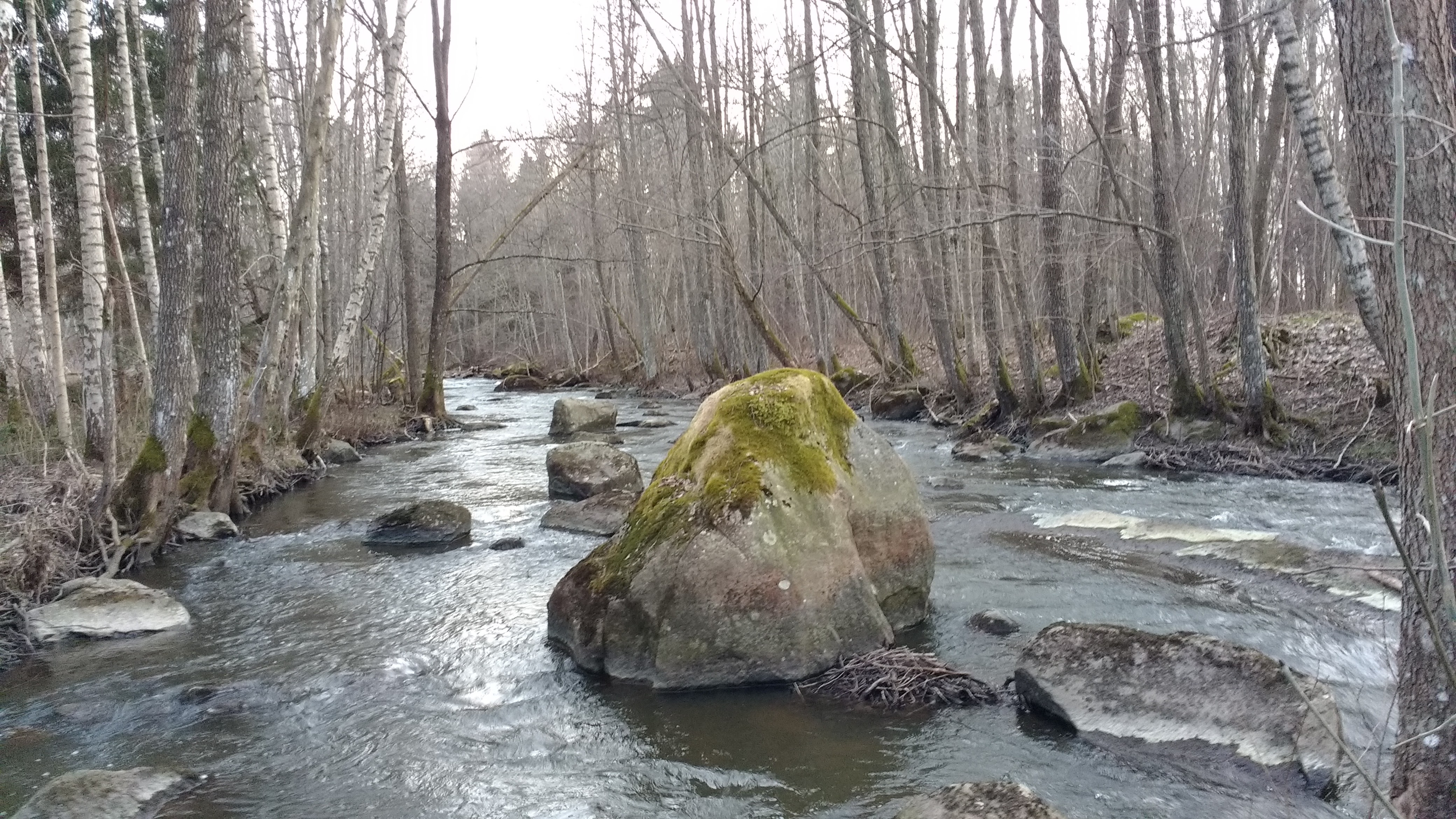 Bilden är tagen i Ösan under början av April. I höjd med Skövde.